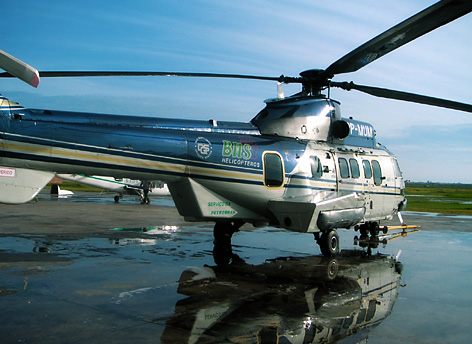 Photo taken in 23 december 2004 at Farol de São Tomé, RJ - Brasil.